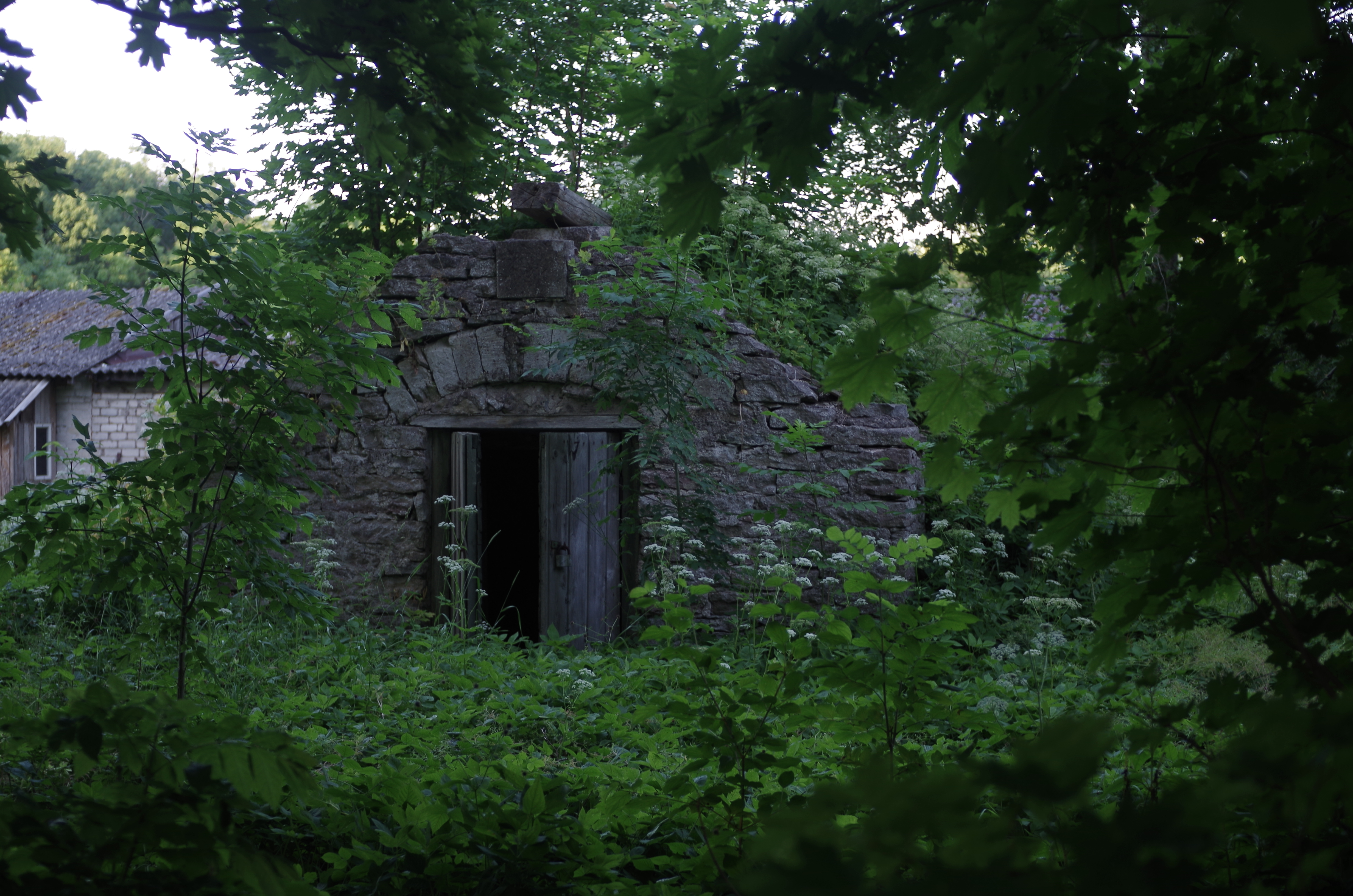 Pilt aastast 2014. Kasti küla, Kaarma vald, Saare maakond.